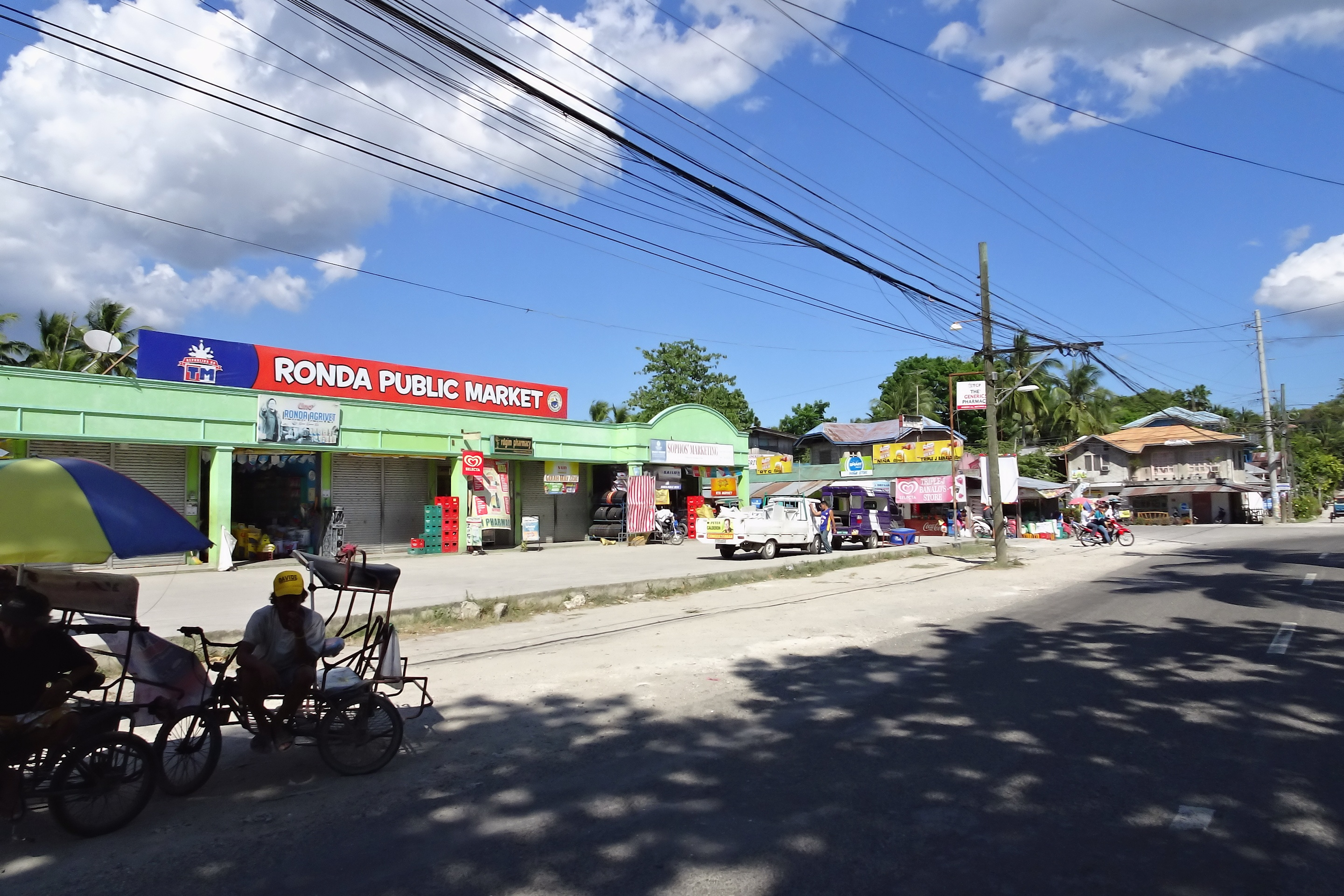 Ronda, Cebu, Philippines